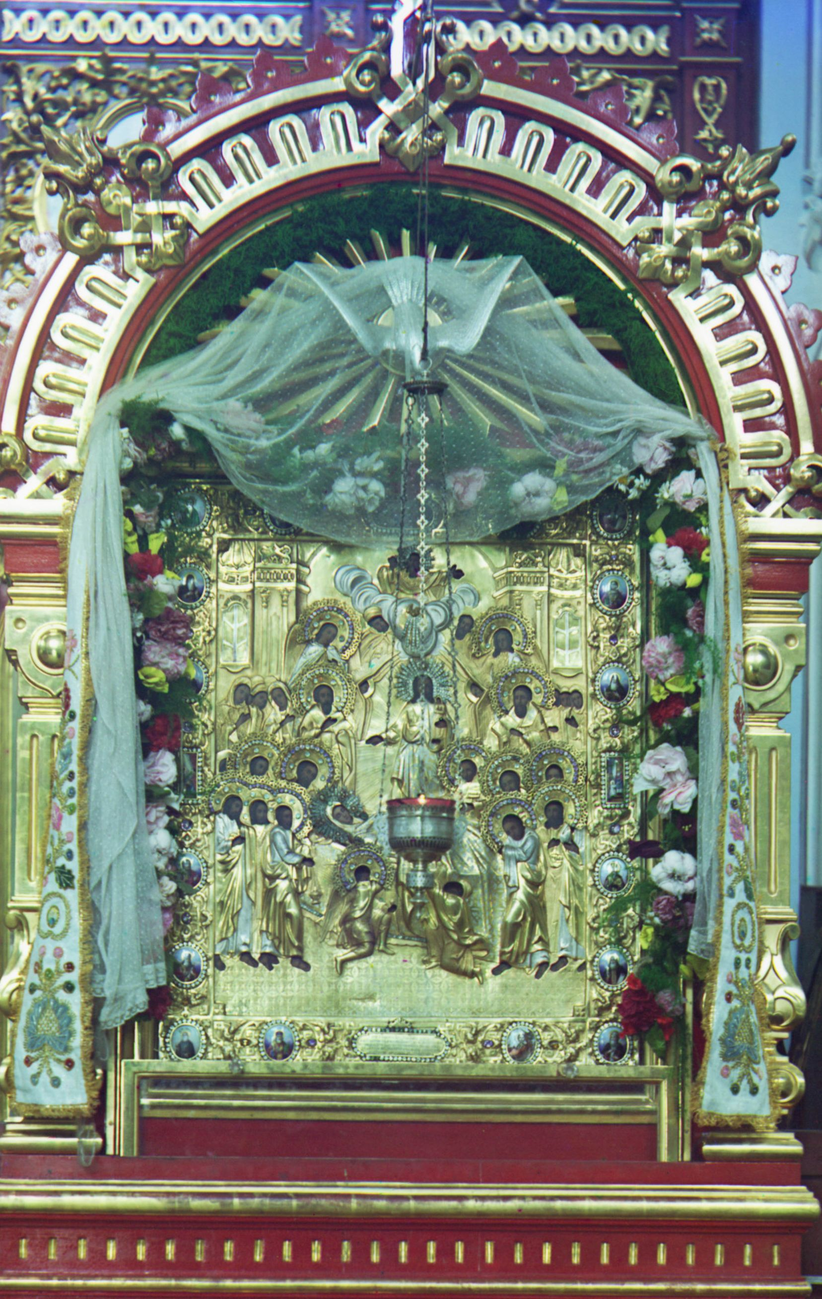 Чудотворная икона Успения, принесенная преподобным Далматом из Невьянской обители (Тобольской губернии). Далматовский монастырь.